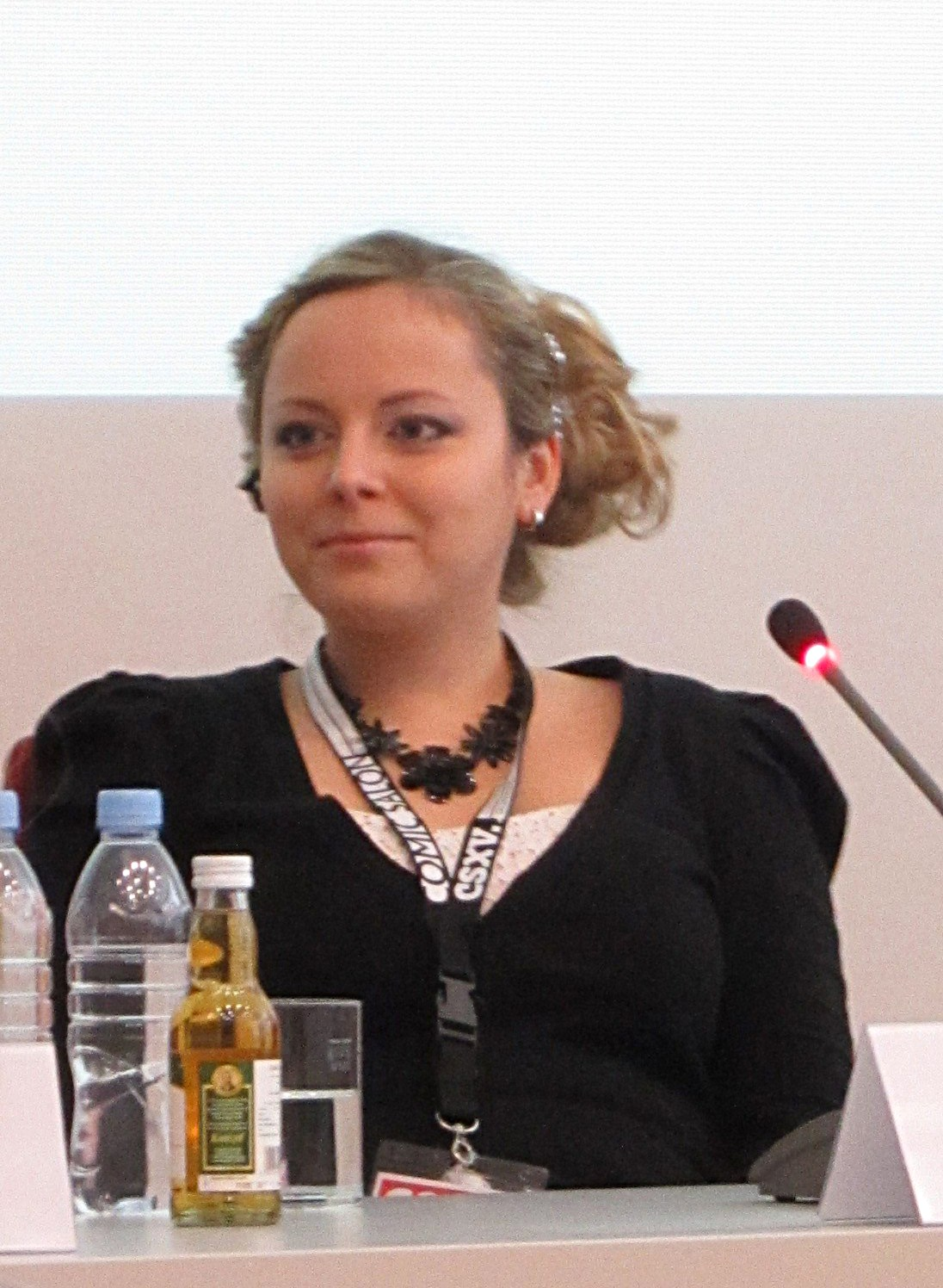 Comic-Salon Erlangen 2012, Zeichnerin Alexandra Völker auf dem Comic-Podium